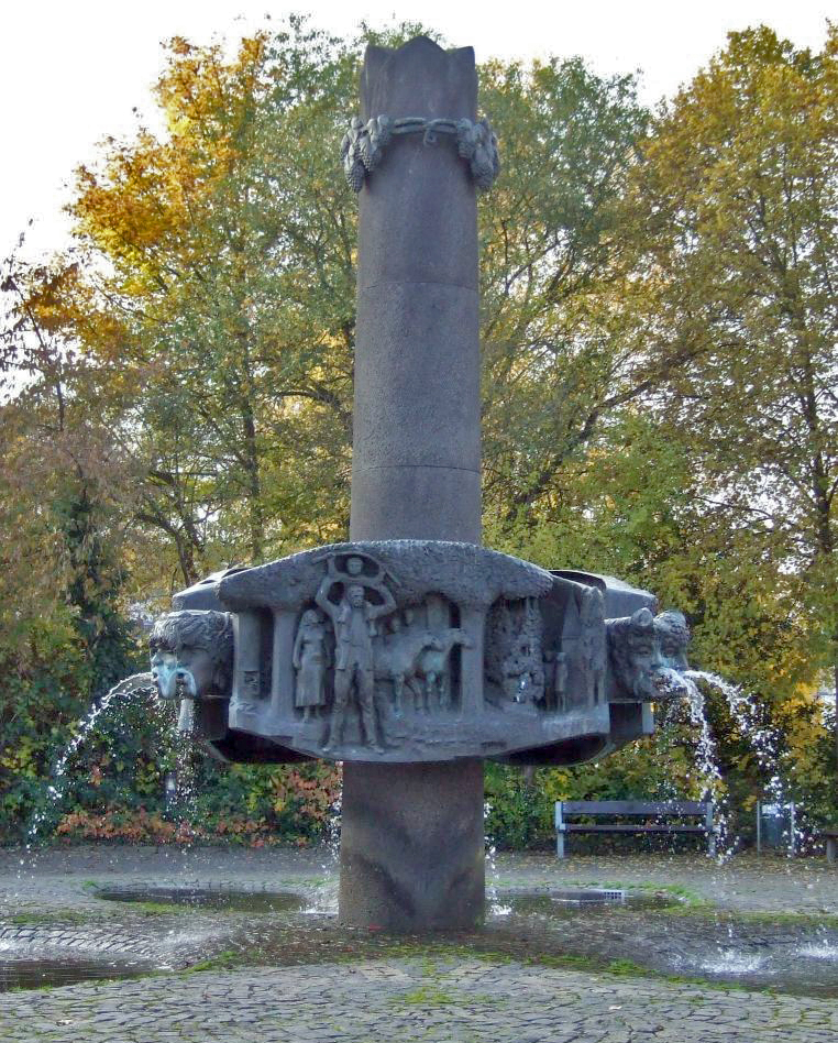 De Stefan-Anders-Sprangbur zu Schweich